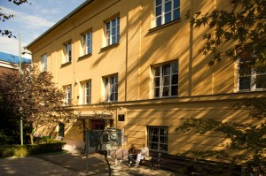 Zdravstveno veleučilište Danas